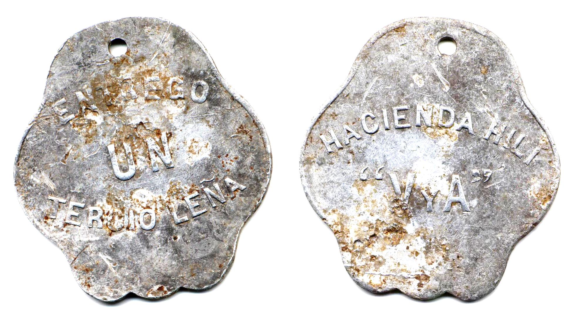 Ficha por 1 Tercio de Leña de la Hacienda Hilí, Yucatán.